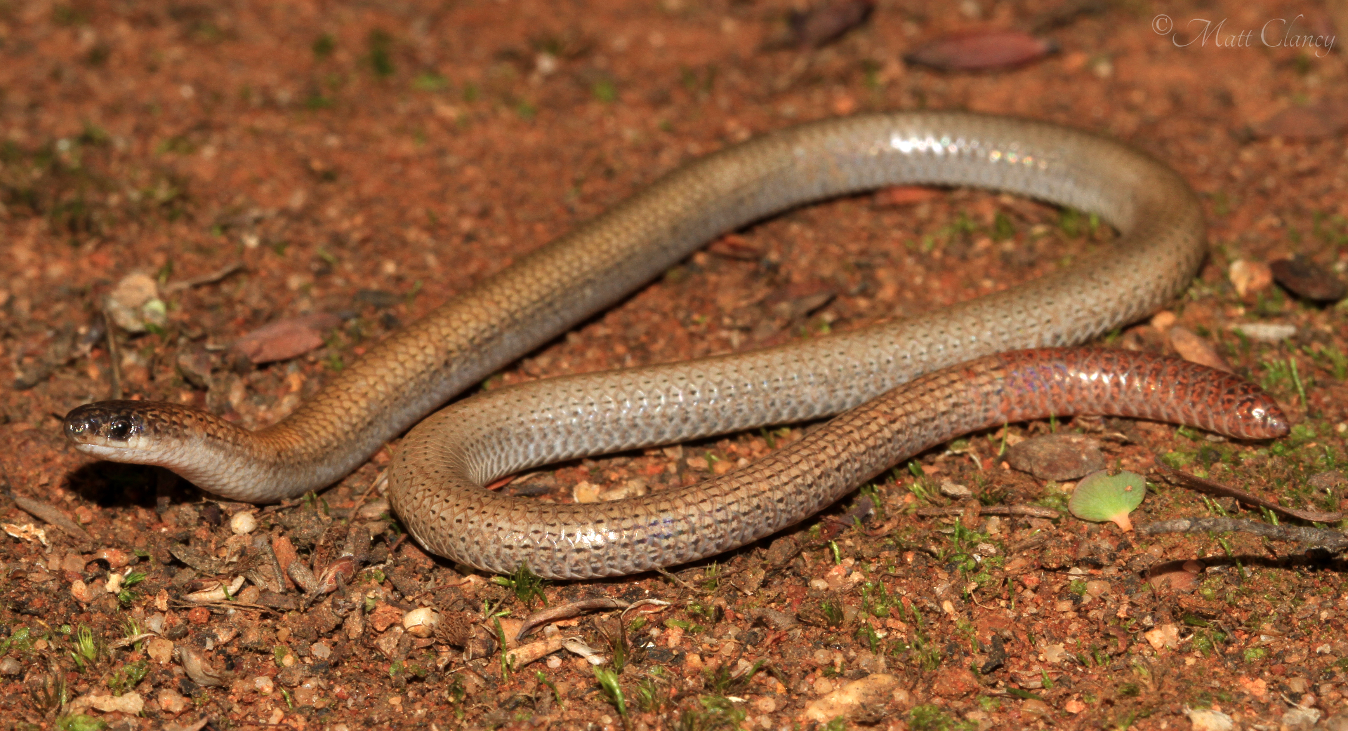 Bendigo district, Vic.